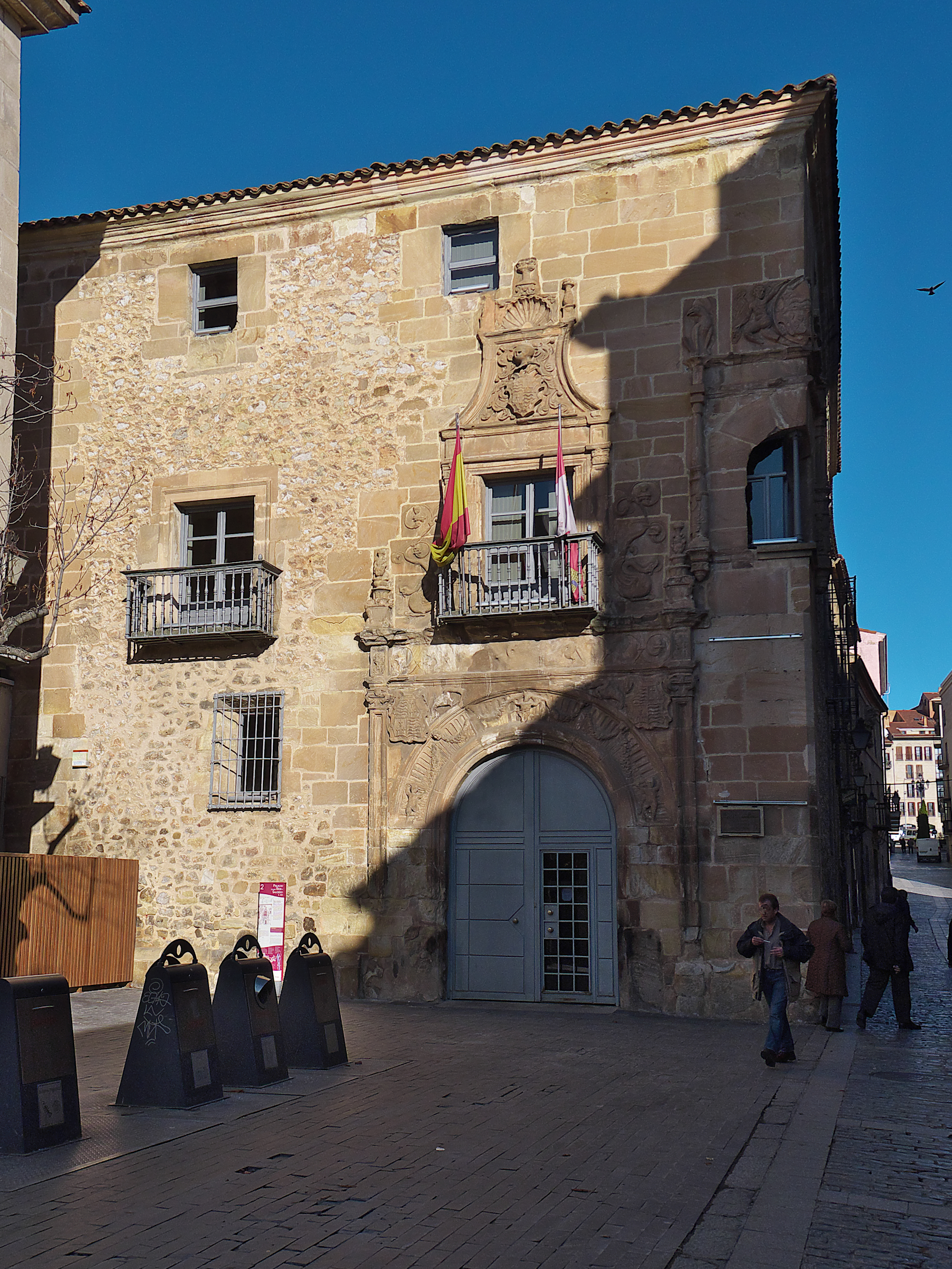 Residencia de una de las importantes familias sorianas. Fachada principal del edificio de primeros del XVI.